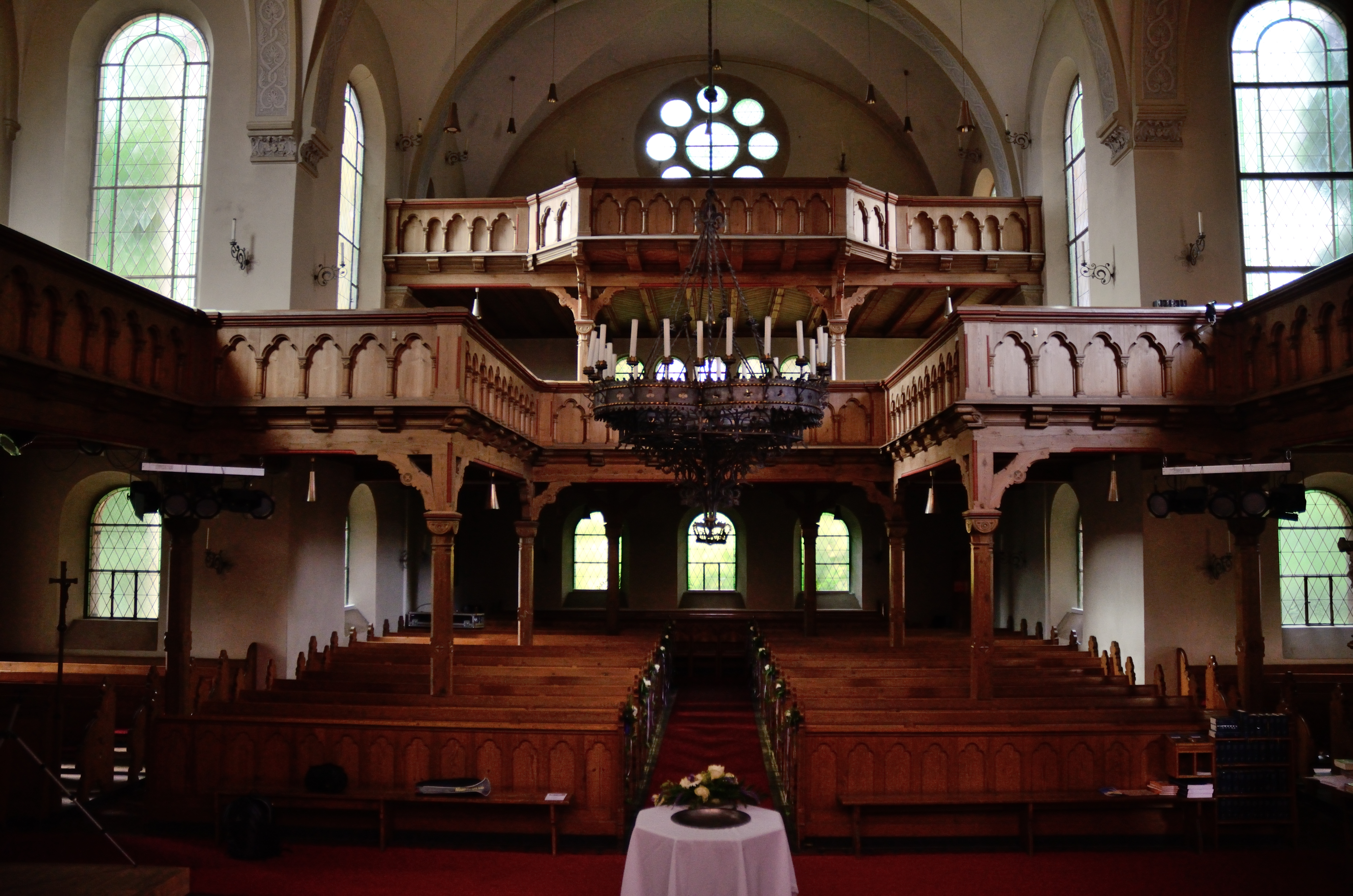 Westseite der St. Nikolaikirche, Neuendettelsau